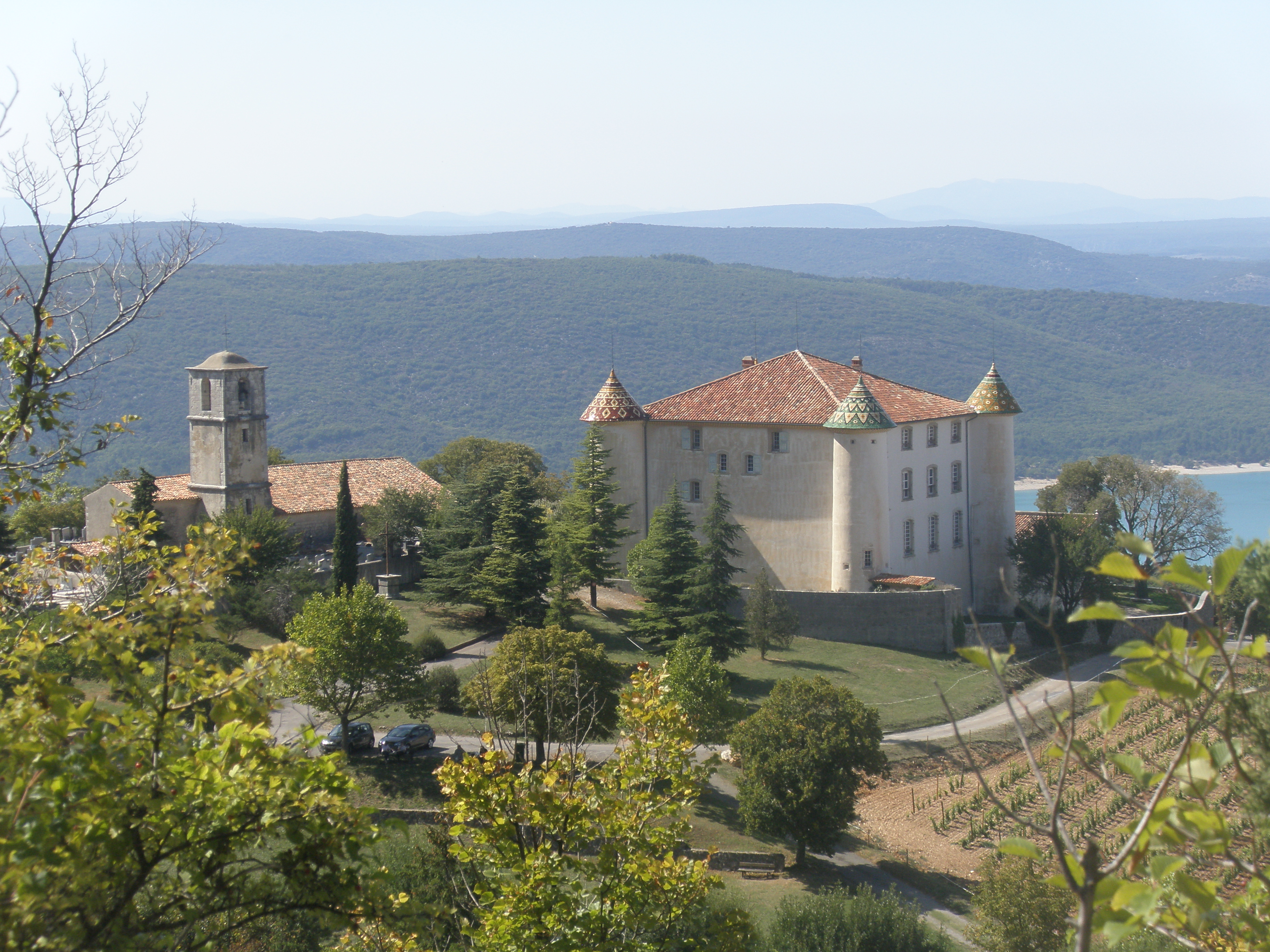 Vue sur le château d'Aiguines depuis le sommet du village